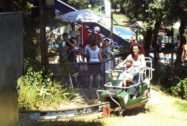 Antic Transmòbil (ara ja desaparegut) del Parc d'Atraccions del Tibidabo.